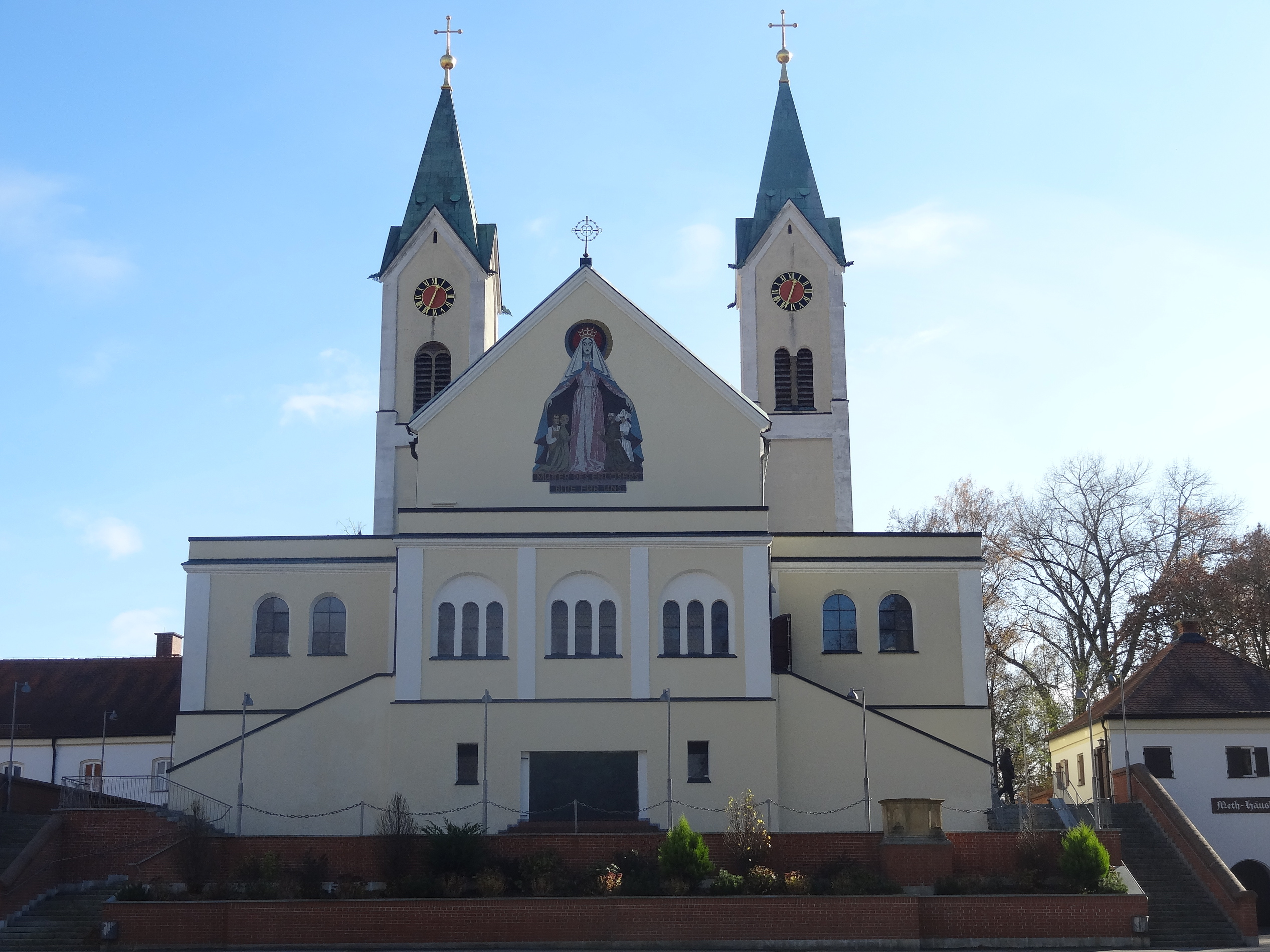 Neuromanische Wallfahrtskirche auf dem Mariahilfberg in Vilsbiburg; dreischiffige Basilika im neuromanischen Stil; erbaut von 1832 bis 1836